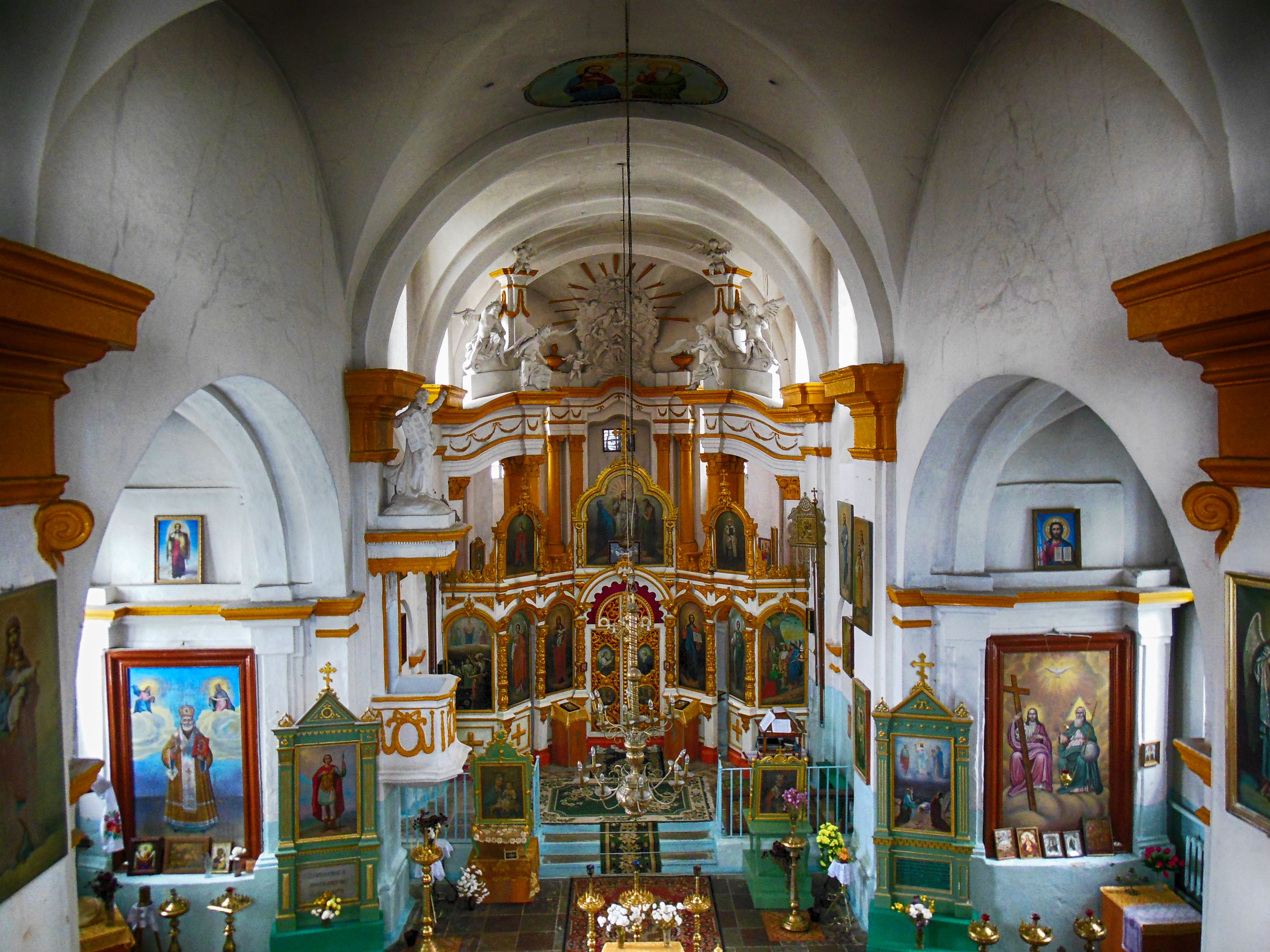 Беларуская (тарашкевіца): Троіцкая царква. в. Вольна This is a photo of Belarusian heritage monument. Reference number: 112Г000051 ( WLM)